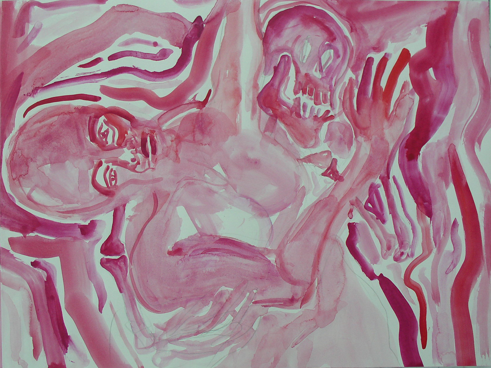 Der Bildhauer Peter Marggraf malt einen sieben Meter langen Totentanz zu einem Gedicht von Clemens Umbricht. Die einzelnen Tafeln werden in einer Kassette als Leporello aufbewahrt.